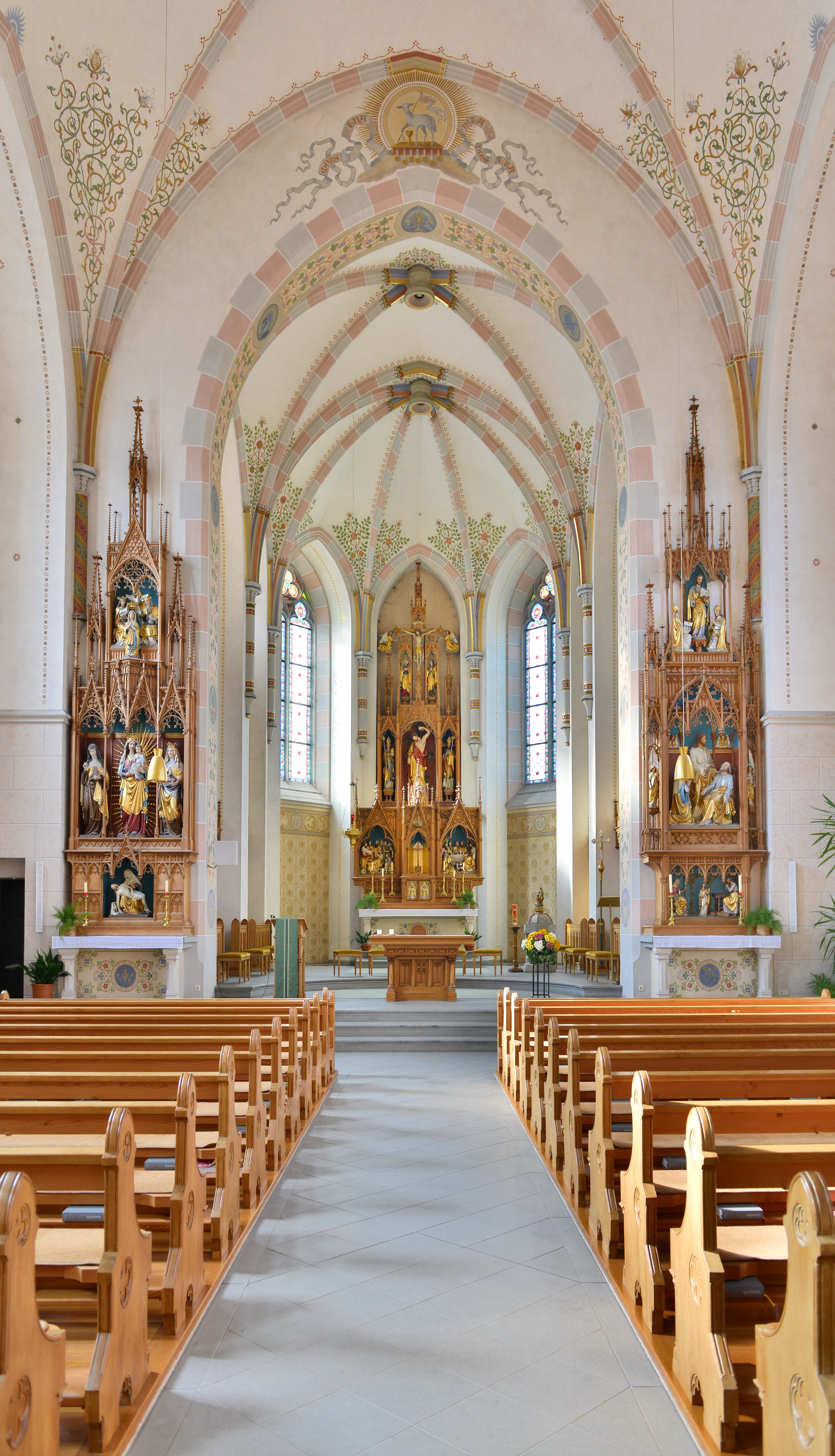 Die Pfarrkirche hl. Sebastian in Schwarzach (Vorarlberg) wurde nach Plan von Peter Huter durch Josef Kröner 1901 bis 1903 im neugotischen Stil erbaut.